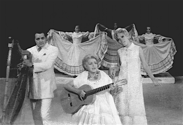 Programa musical en television en la decada de los años 70